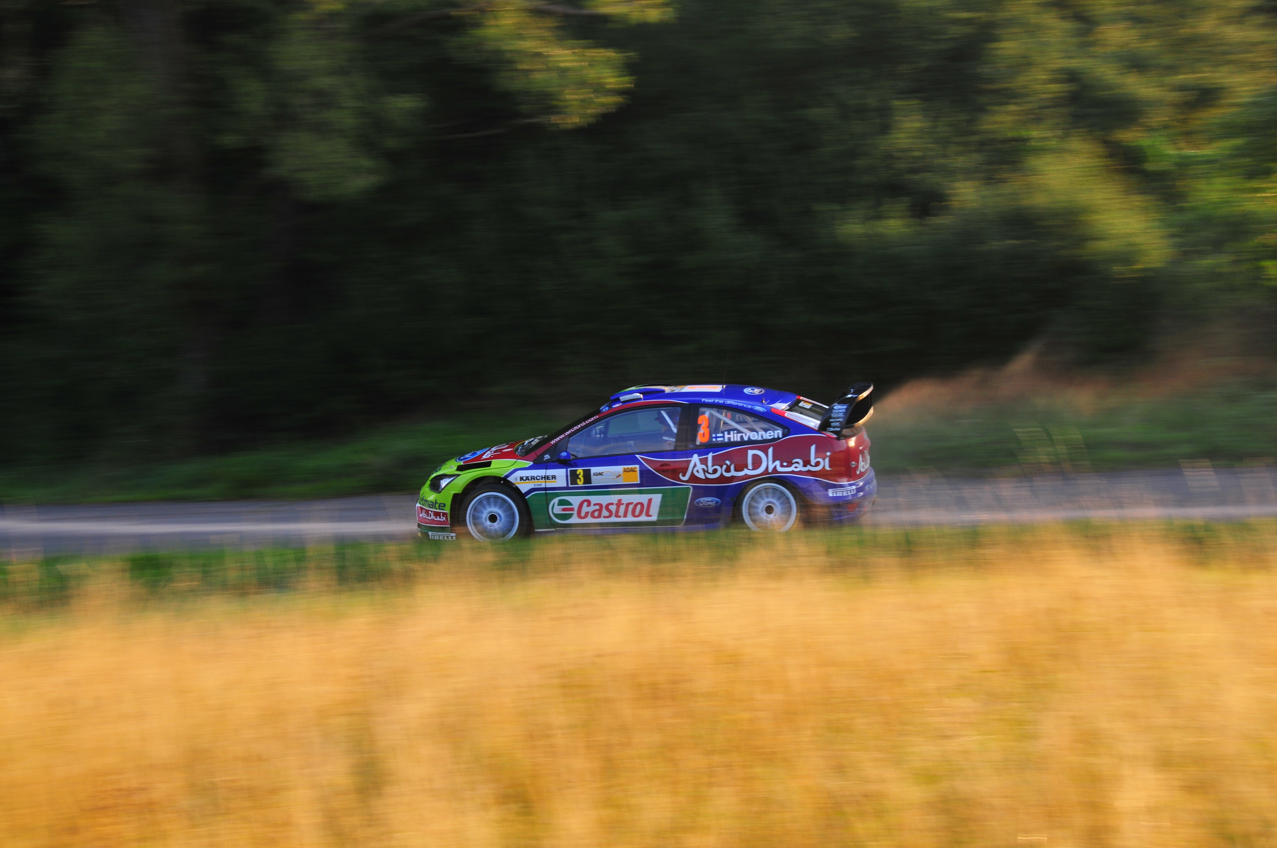 Mikko Hirvonen driving his Ford Focus RS WRC 08 at the 2008 Rallye Deutschland.